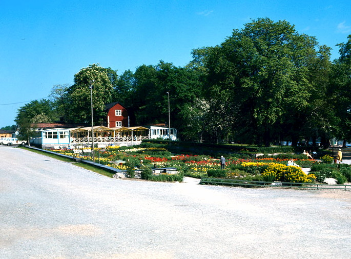 Källhagen. Blomsterträdgården och värdshuset sedda från väster.